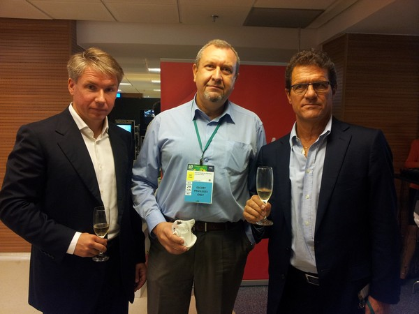 Презентация 29 июня 2013 г. на стадионе «Маракана» г.Рио-де-Жанейро проведения в России Чемпионата мира по футболу в 2018 году при участии гендиректора Оргкомитета ЧМ-2018 А.Л.Сорокина и главного тренера российской сборной по футболу Фабио Капелло.